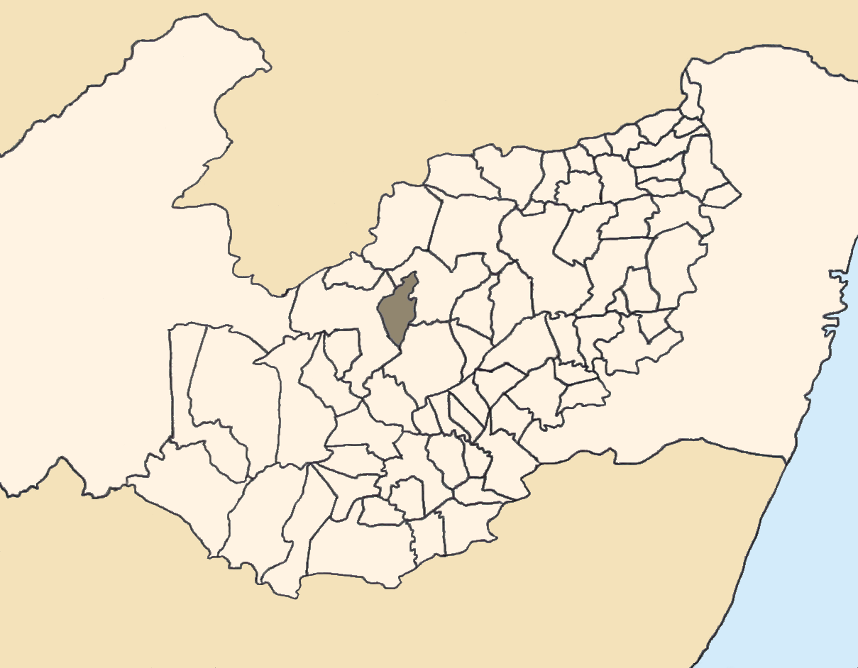 Mapa da mesorregião Agreste de Pernambuco (Brasil) subdivida em municípios. Em destaque, o município de Sanharó. Map of the brazilian state of Pernambuco (mesorregião Agreste) showing the city of Sanharó. Imagem tratada com o GIMP. Image made with GIMP.